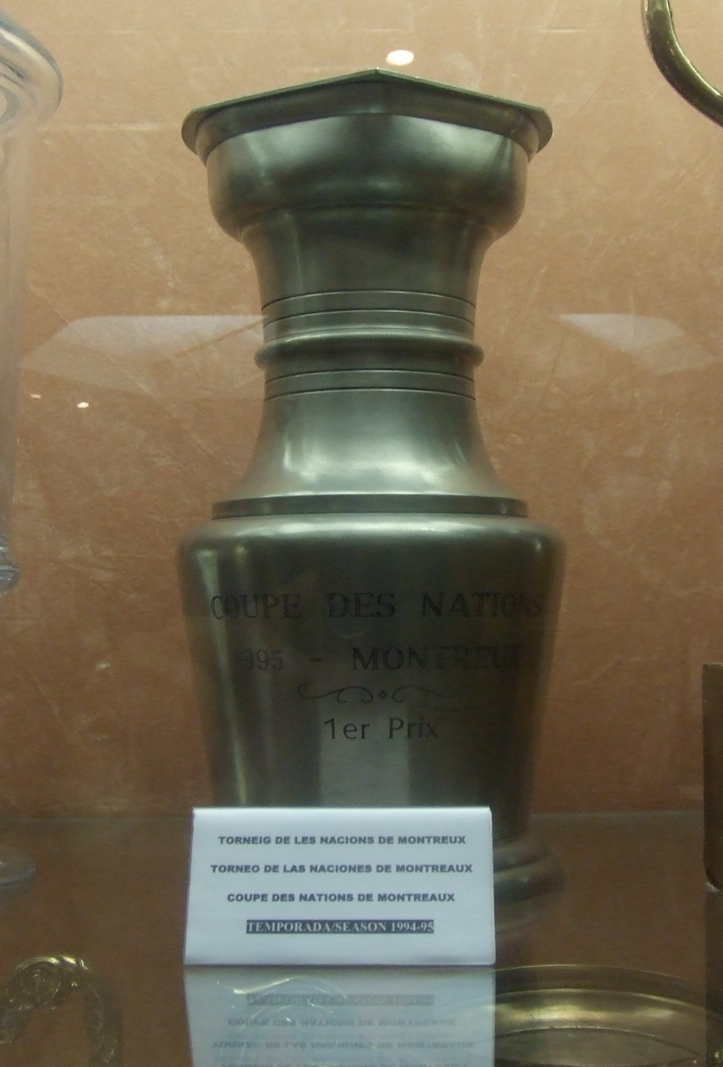 Coupe des Nations de Montreux conseguida por la sección de hockey patines del F.C. Barcelona.